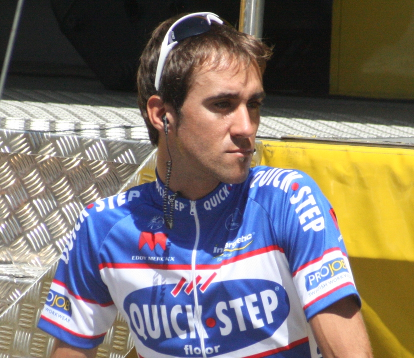 Départ de la 4e étape du Tour de France 2010 à Cambrai - Carlos Barredo